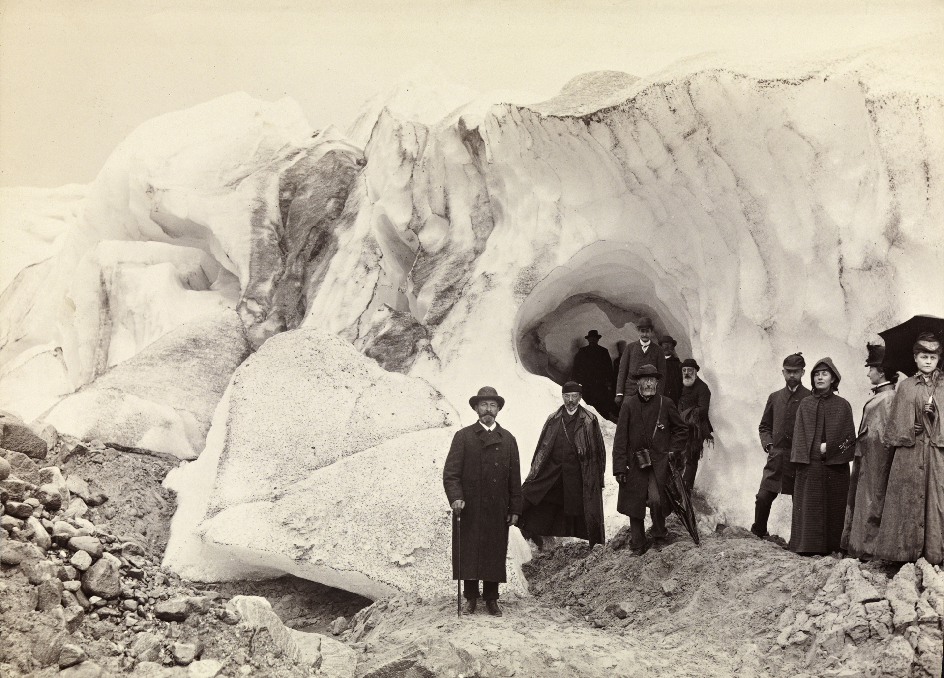 Tittel / Title: 2698. Nordland, Svartisen, Isformer Sted / Place: Nordland, Svartisen